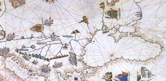 Vesconte Maggiolo, Portolankarte (1541)